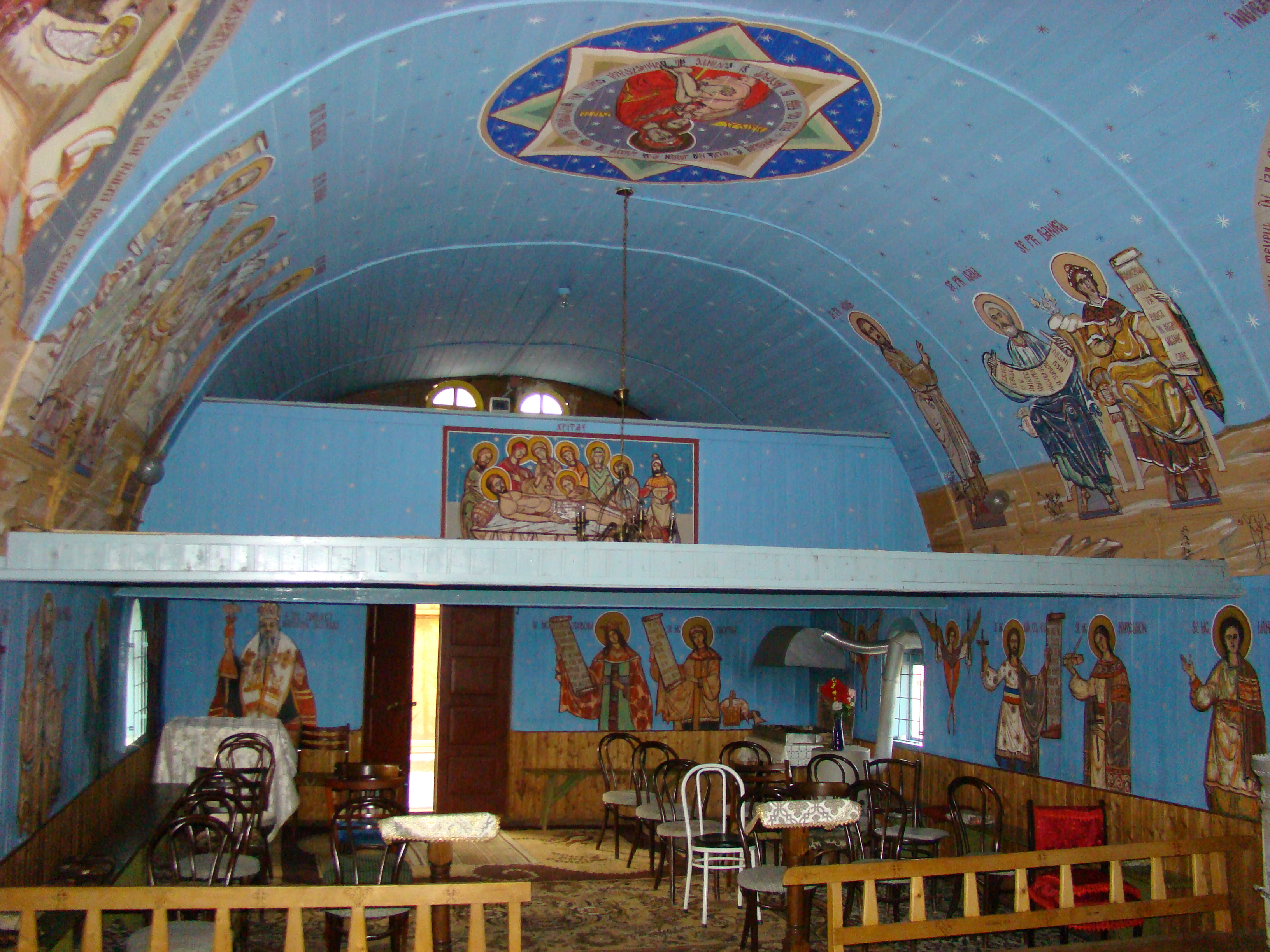 Biserica de lemn din Nima Râciului, județul Mureș